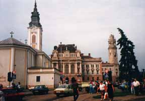 Nagyváradi utcakép a Szent László-templommal